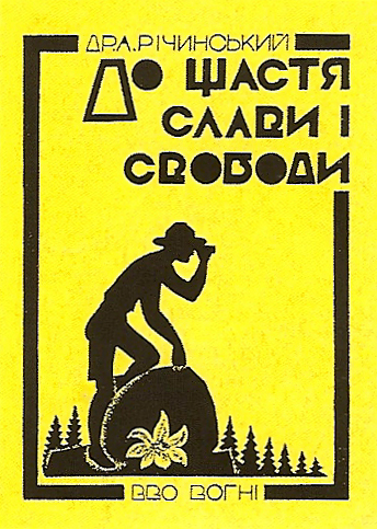 Обкладинка книжки роботи Антона Малюци.